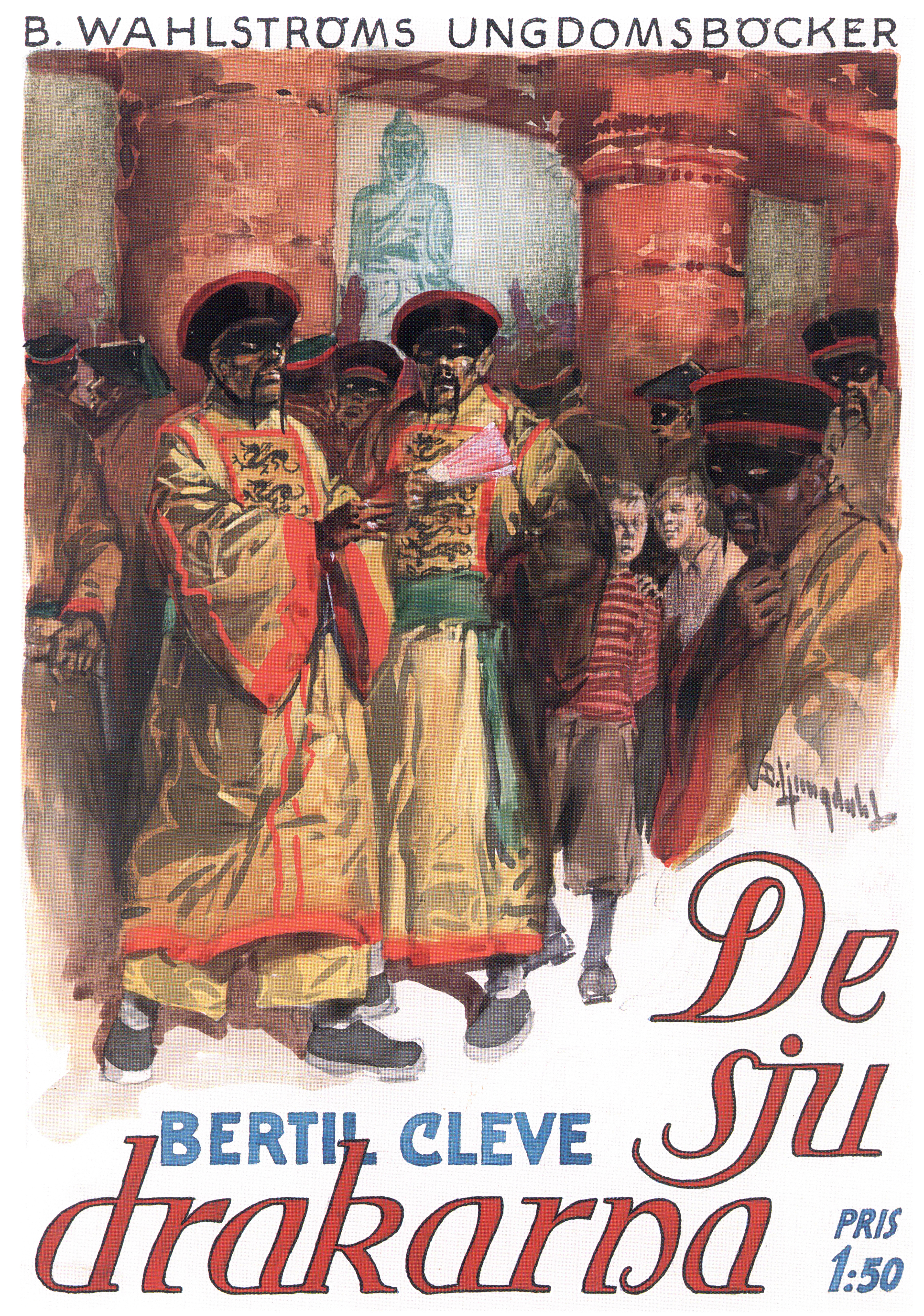 Bokomslag till Cleve - De sju drakarna Artist: David Ljungdahl (1870-1940)